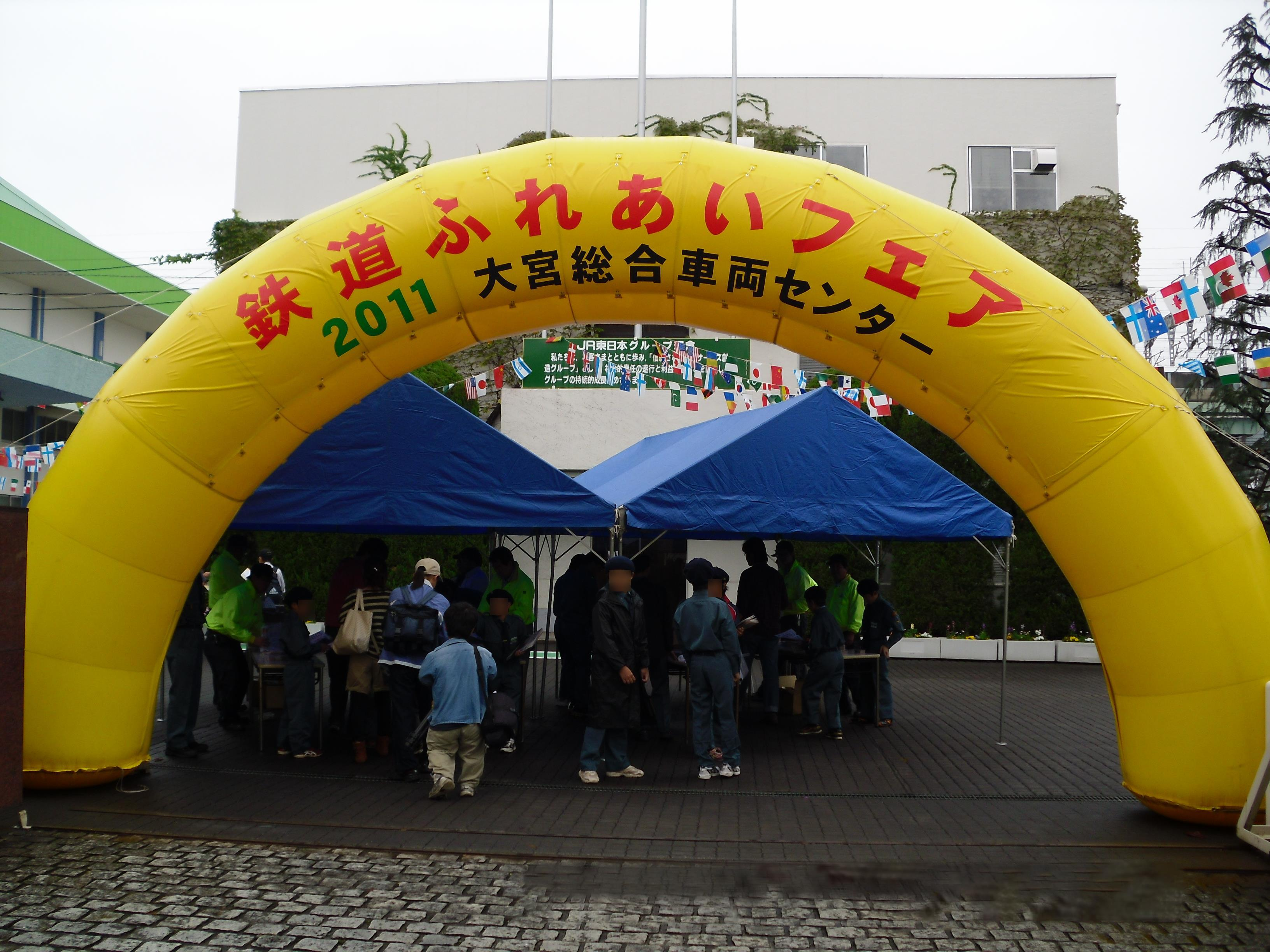 大宮総合車両センター正面口－「JRおおみや 鉄道ふれあいフェア2011」にて